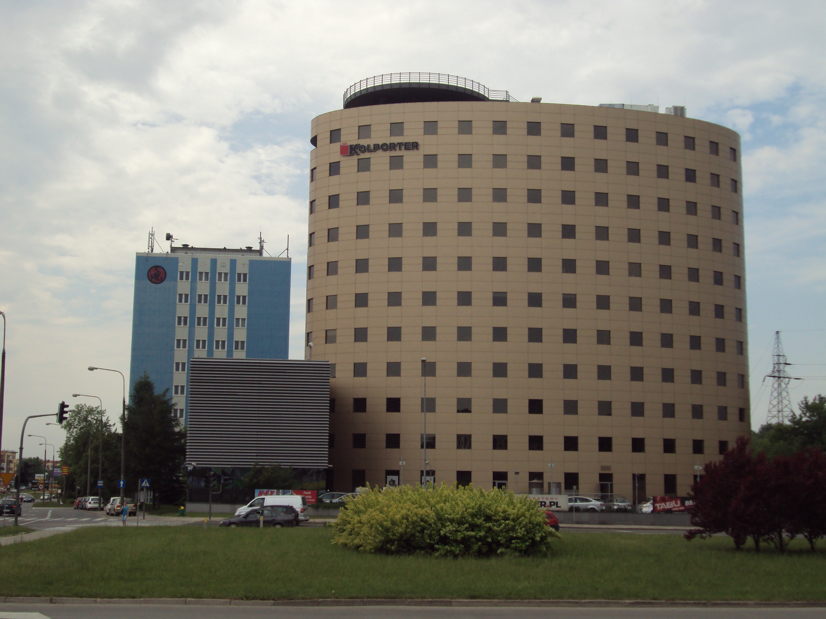 Siedziba Kolporter w Kielcach ul. Zagnanska